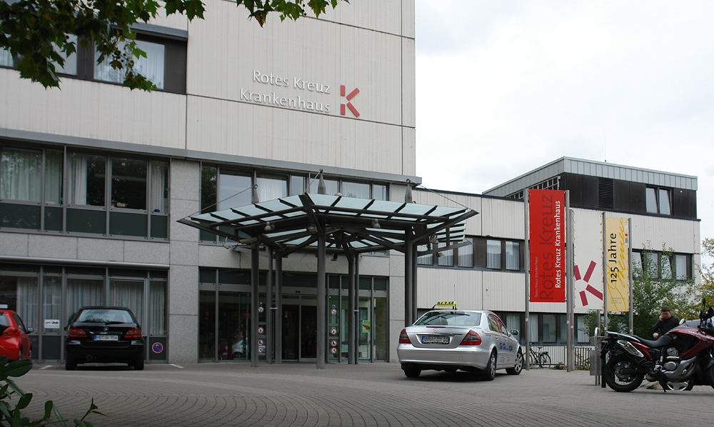 Rotes Kreuz Krankenhaus Bremen, St.-Pauli-Deich 24